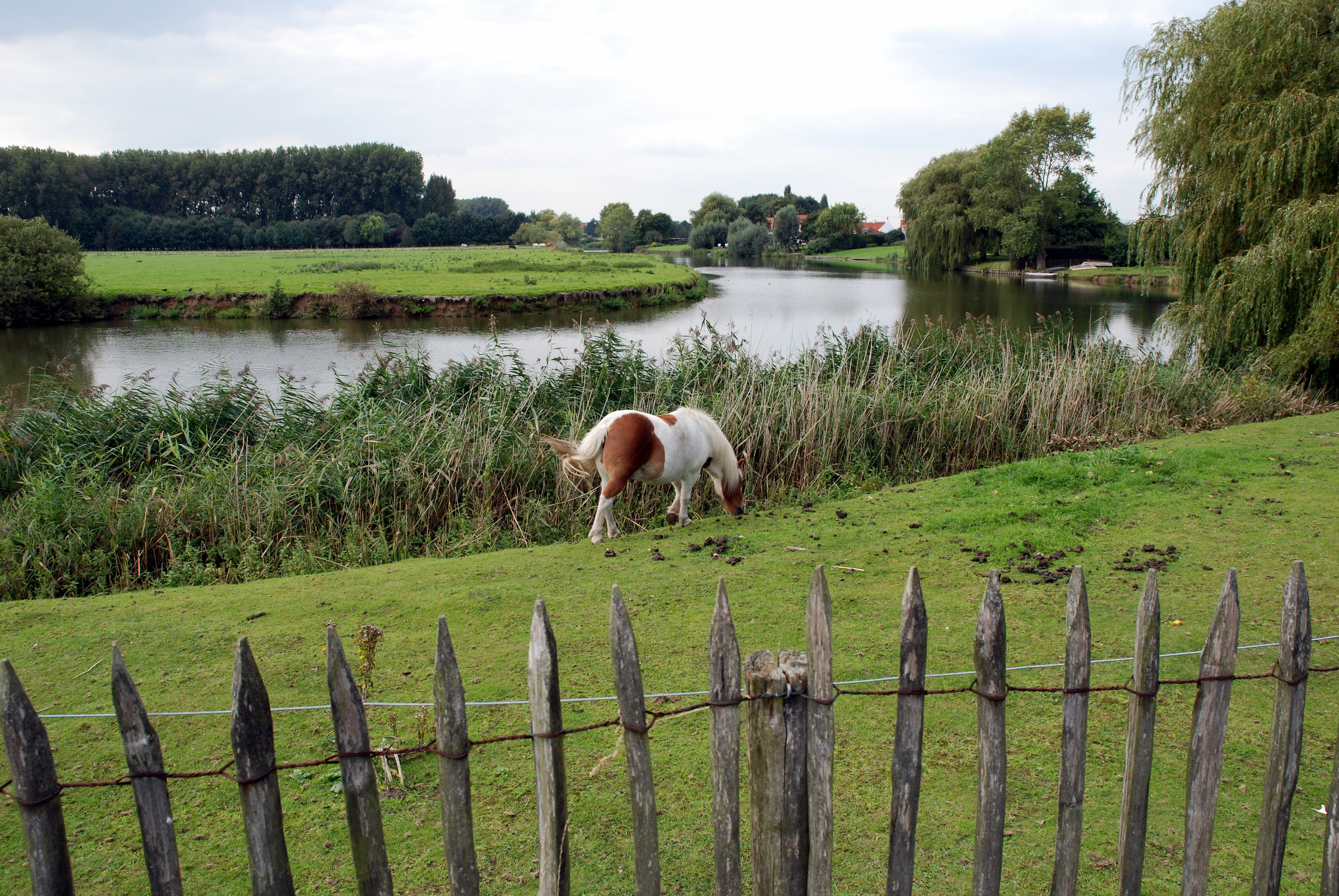 Afgesloten arm van de Leie in Bachte, Bachte-Maria-Leerne